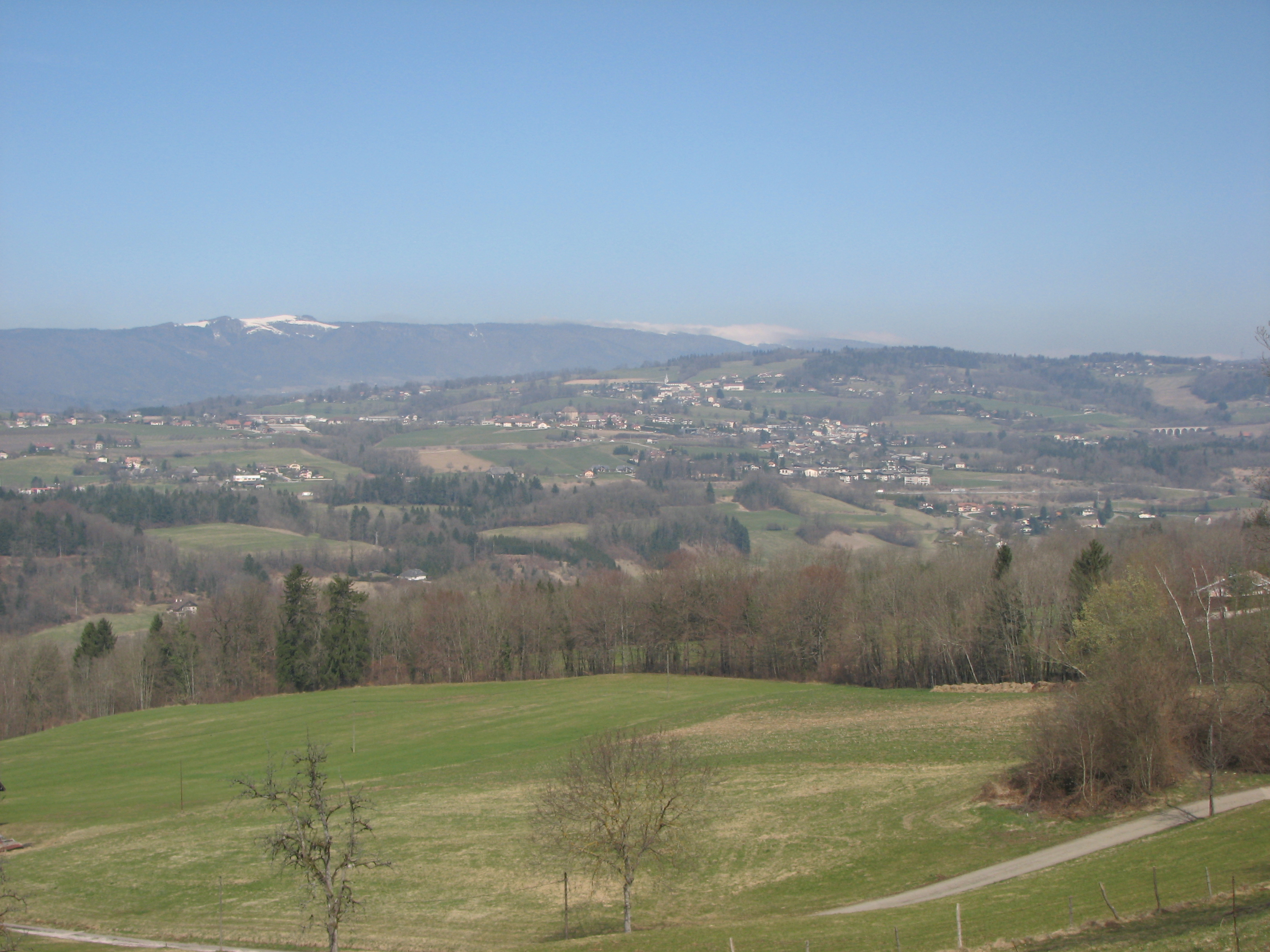 Vue d'ensemble de Groisy depuis Villaz